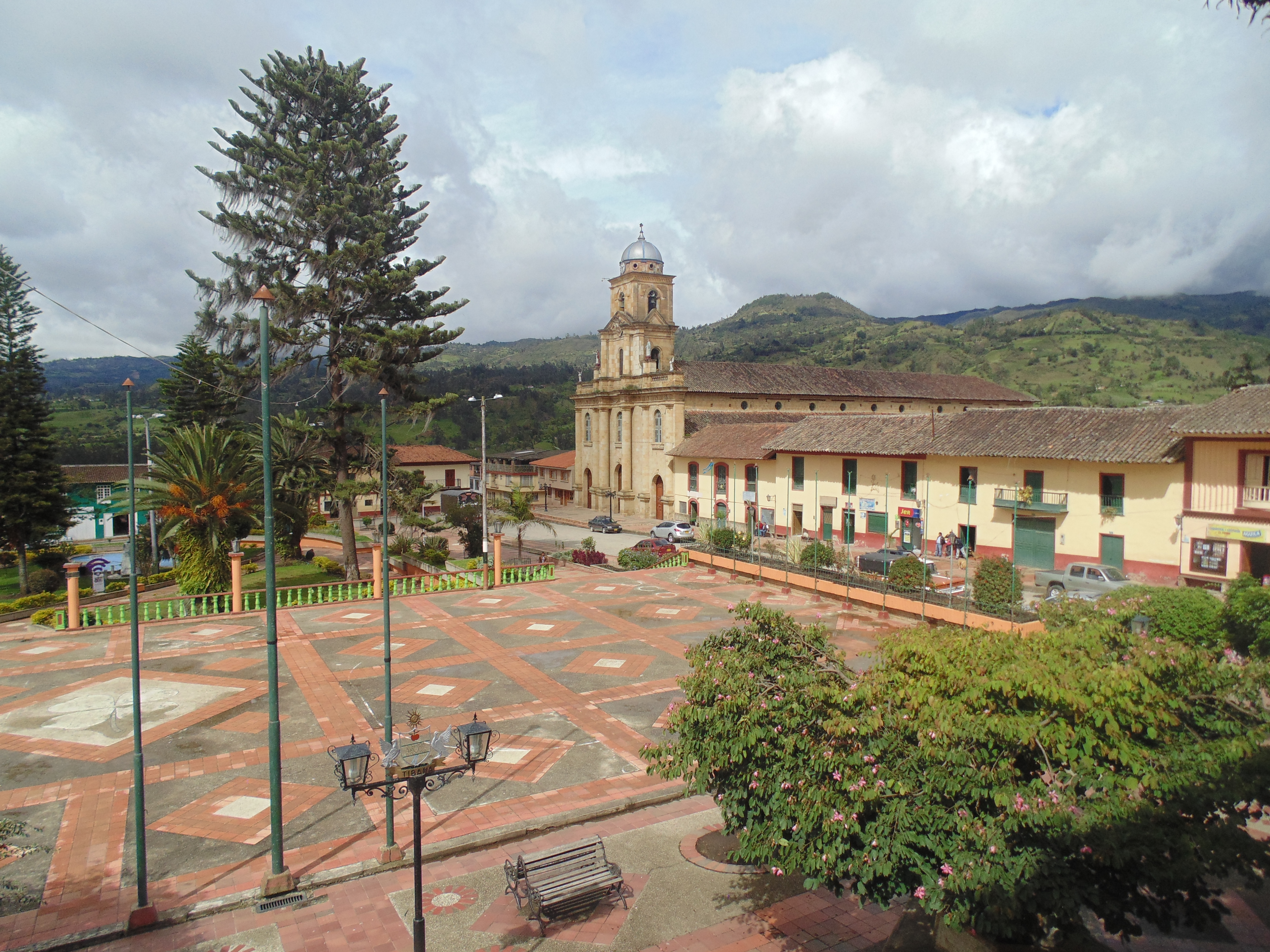 Parque principal del municipio de Tibaná, Boyacá (2015).